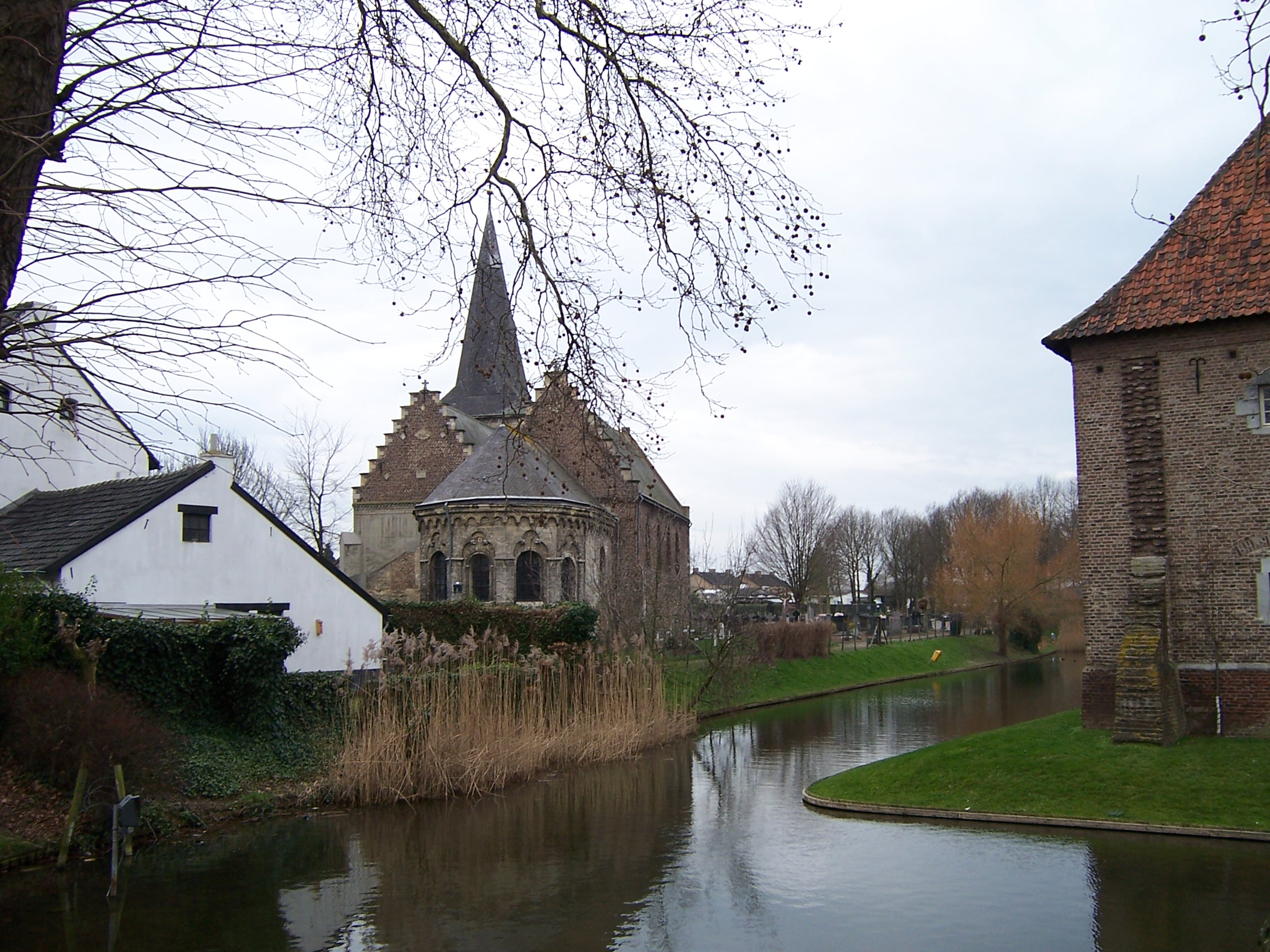 oude kerk Limbricht